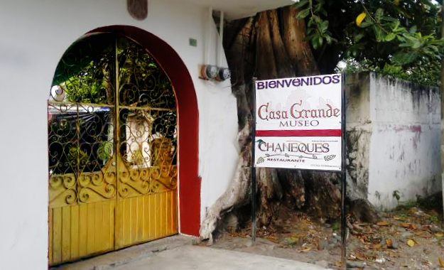 La entrada al museo Casa Grande actualmente, lugar donde vivió Lucía Zárate en el siglo XIX